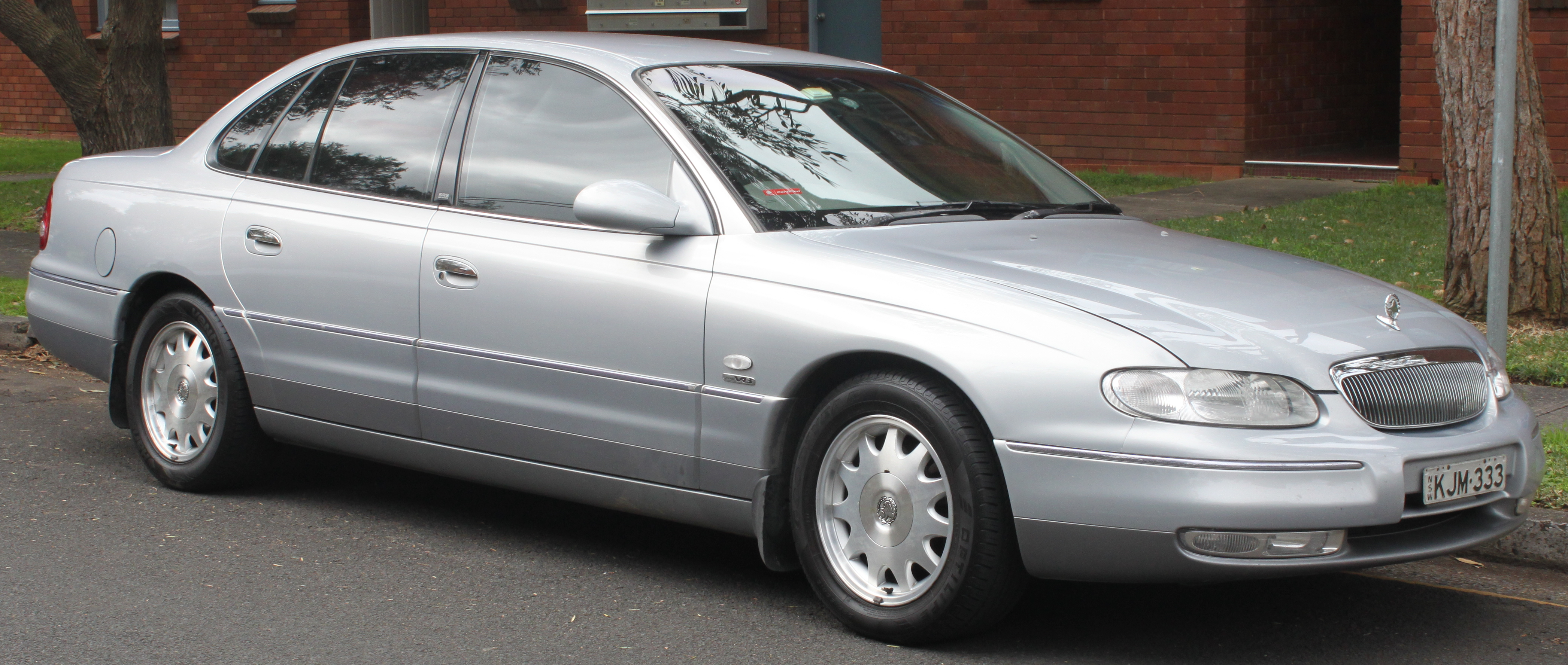 Holden Caprice WH